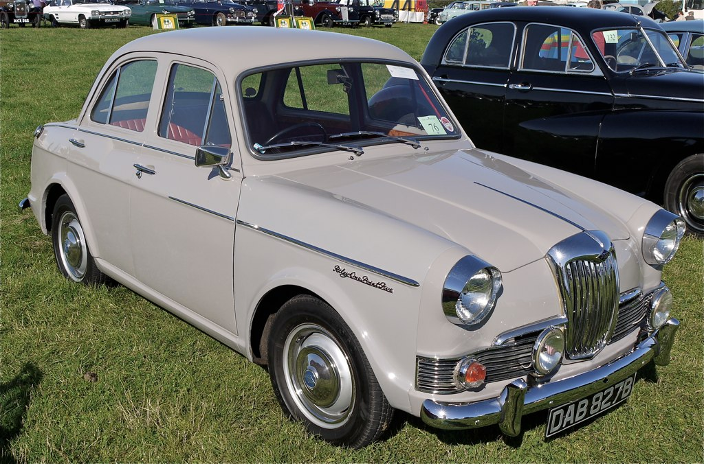 Panasonic G1 14-45 Lens